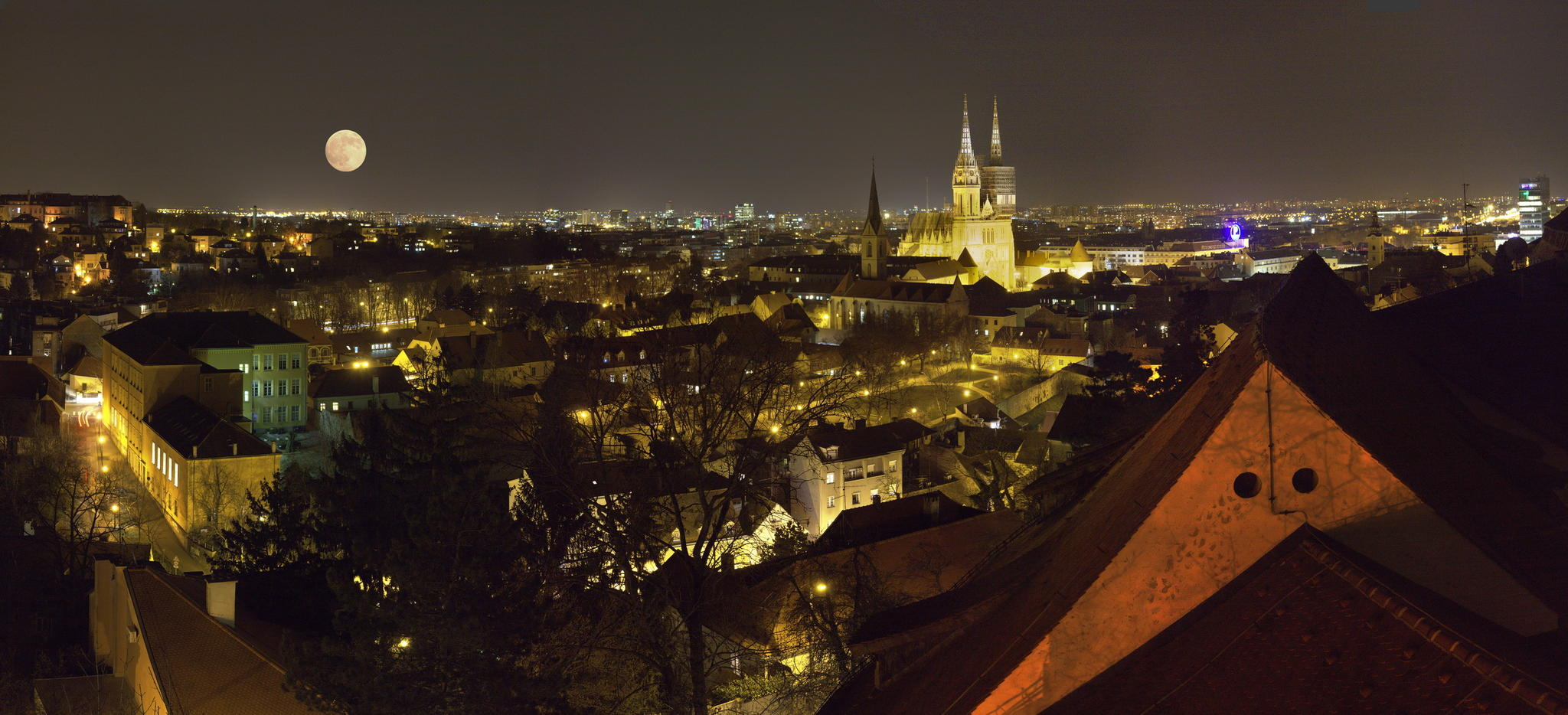 Zagreb, Capitale De La Croatie